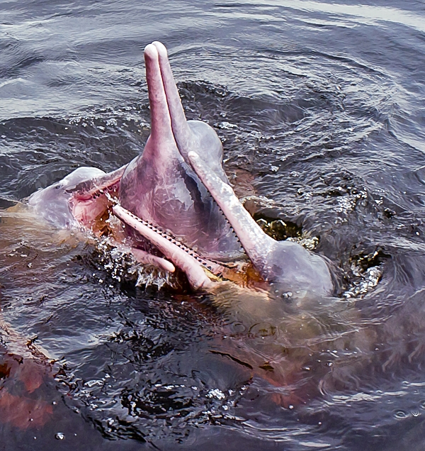 Boto cor de rosa.